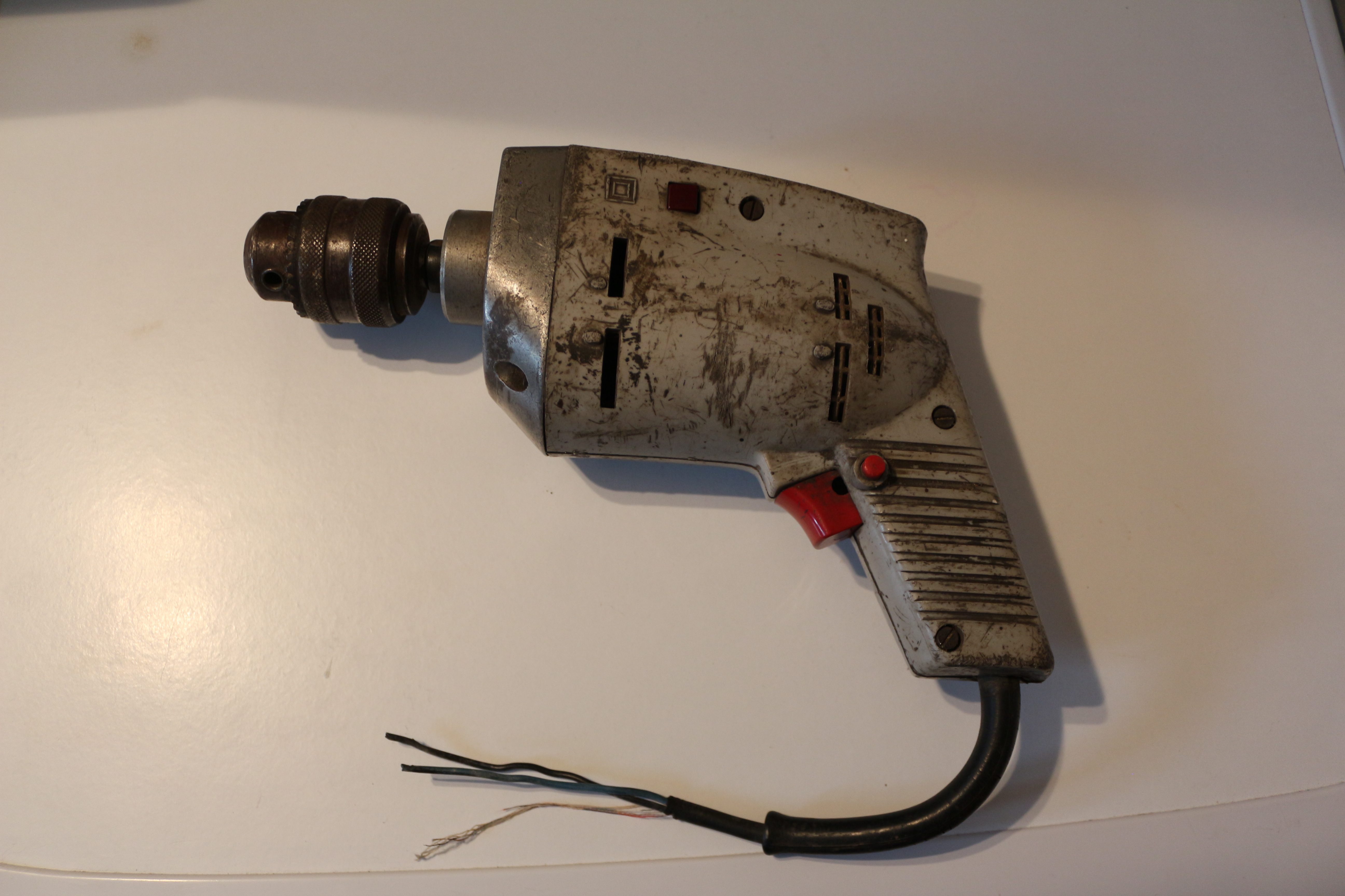 Die 1963 von Wolfgang Dyroff entworfene Handbohrmaschine HBM 250, genannt Multimax, wurde von 1963 bis 1989 im VEB Elektrowerkzeuge Sebnitz an der damaligen tschechoslowakischen Grenze produziert. (Foto: Draufsicht, Gerät)